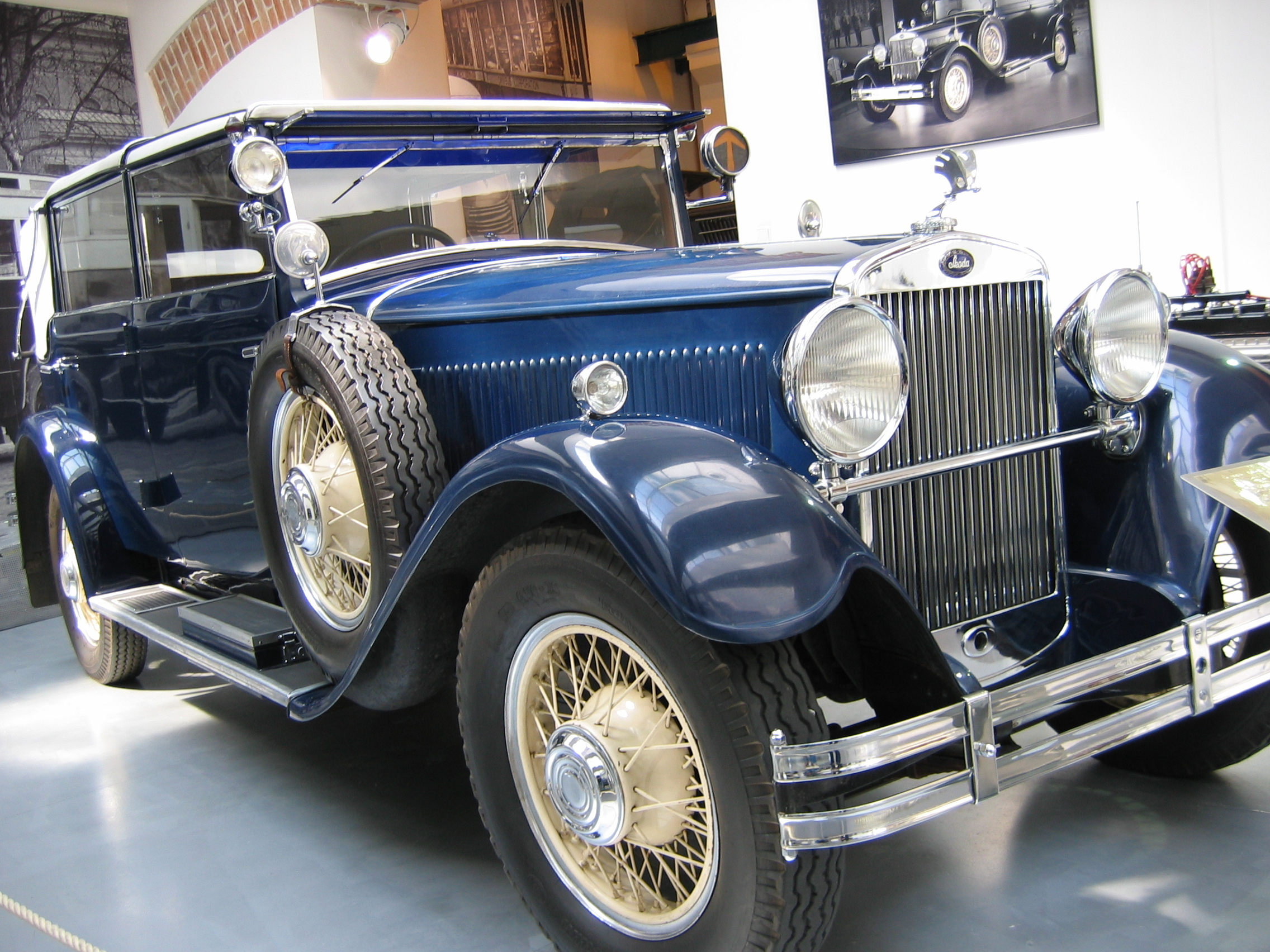 Škoda Auto Museum, Mlada Boleslav